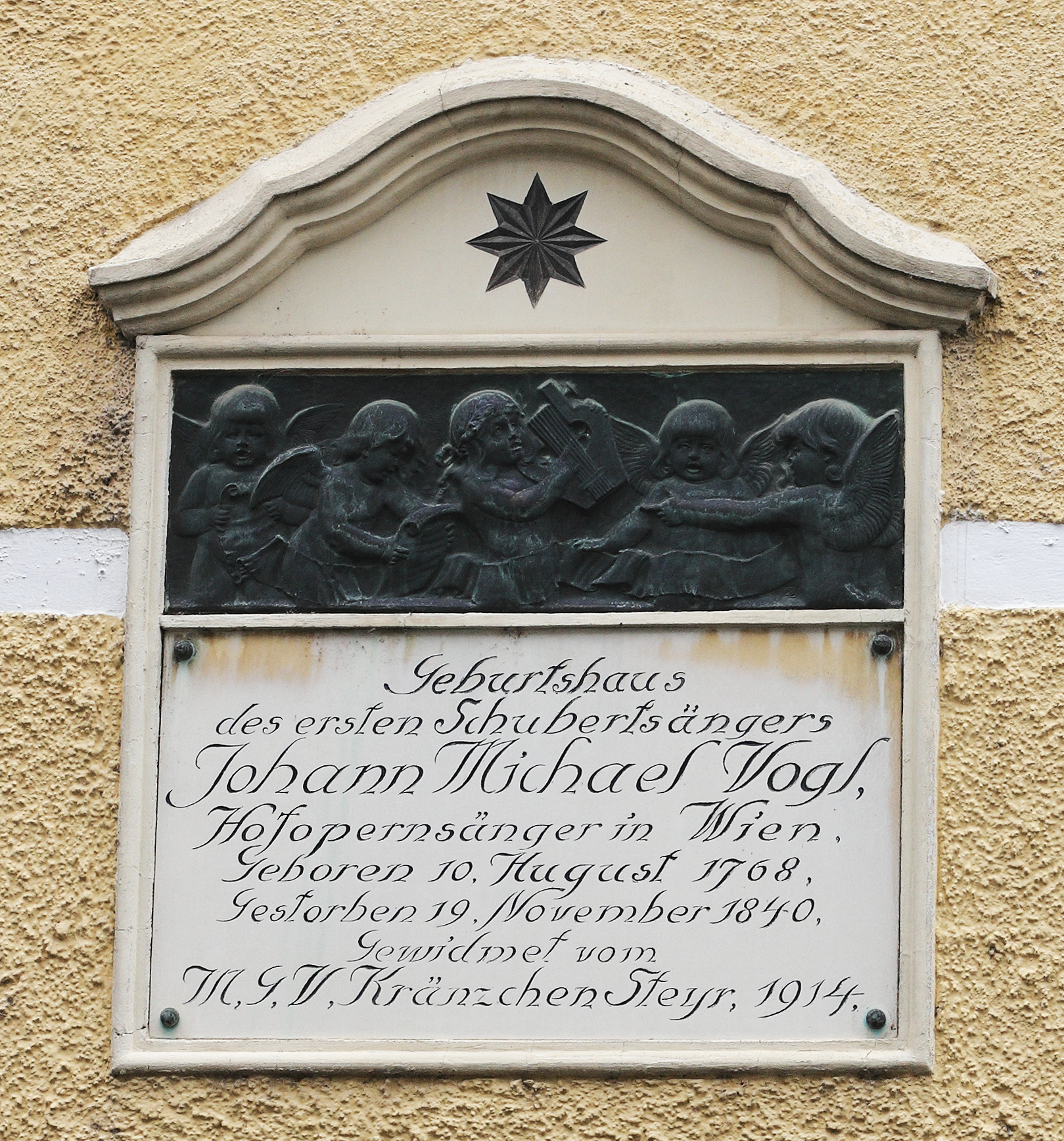 Steyr: Gedenktafel am Geburtshaus Johann Michael Vogls Haratzmüllerstraße 32. Die vom Männergesangsverein Kränzchen (siehe auch Steyrer MGV Sängerlust) gewidmete Tafel wurde am 7. Juli 1914 enthüllt. Künstler ist Leo Zimpel.[1] Transkription: Geburtshaus des ersten Schubertsängers Johann Michael Vogl,Hofopernsänger in Wien.Geboren 10. August 1768.Gestorben 19. November 1840. Gewidmet vomM. G. V. Kränzchen Steyr, 1914.